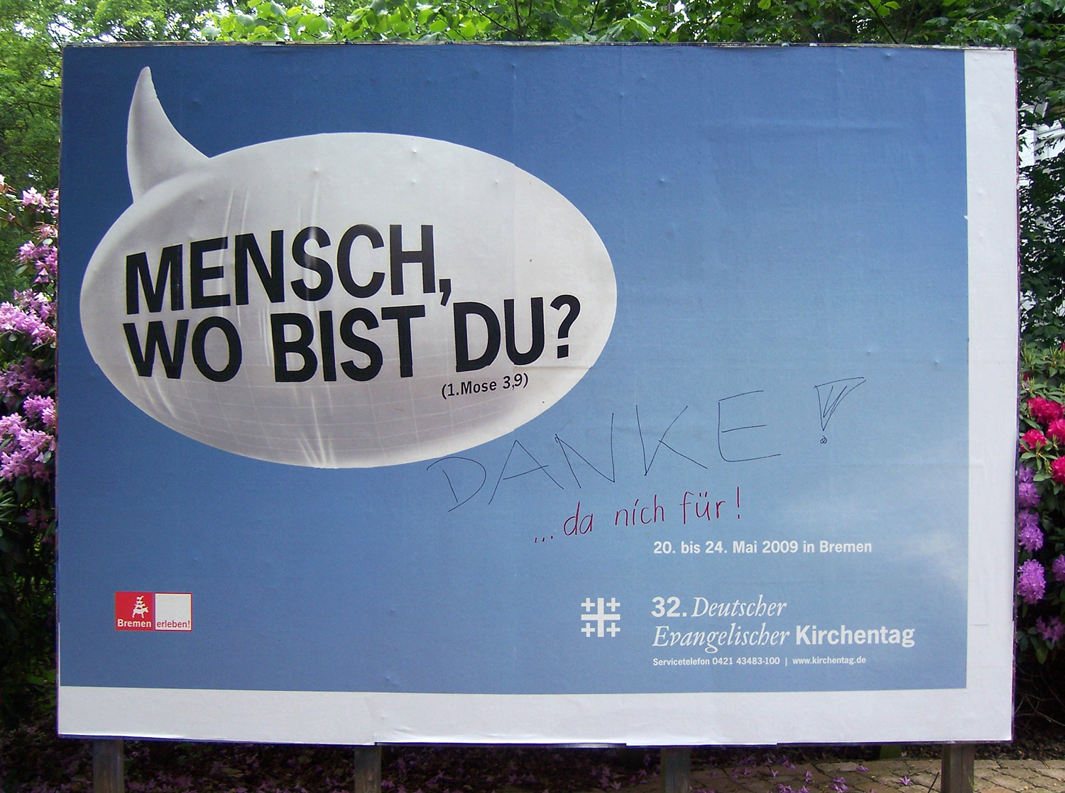 Ev. Kirchentag 2009 in Bremen: Dank an die Helfer am Forum Kirche, Holler Allee 75